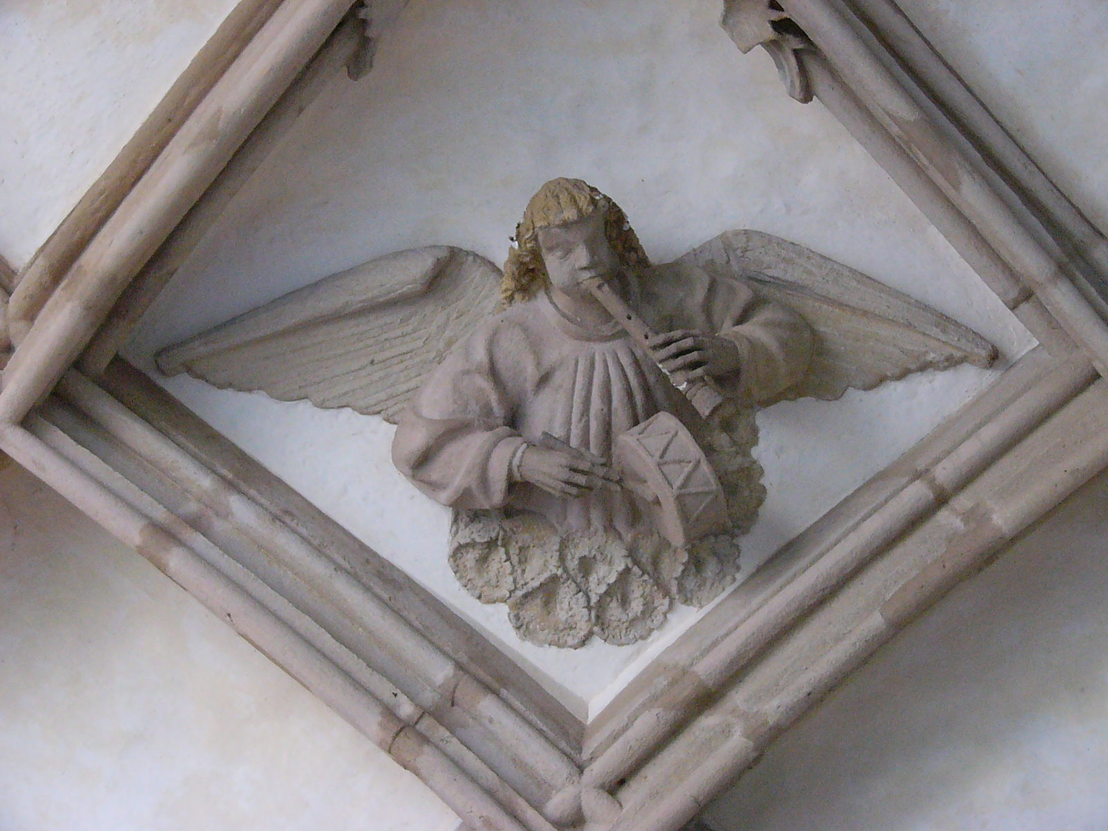 Musizierende Engel im Gewölbe des Himmelkroner Kreuzgangs